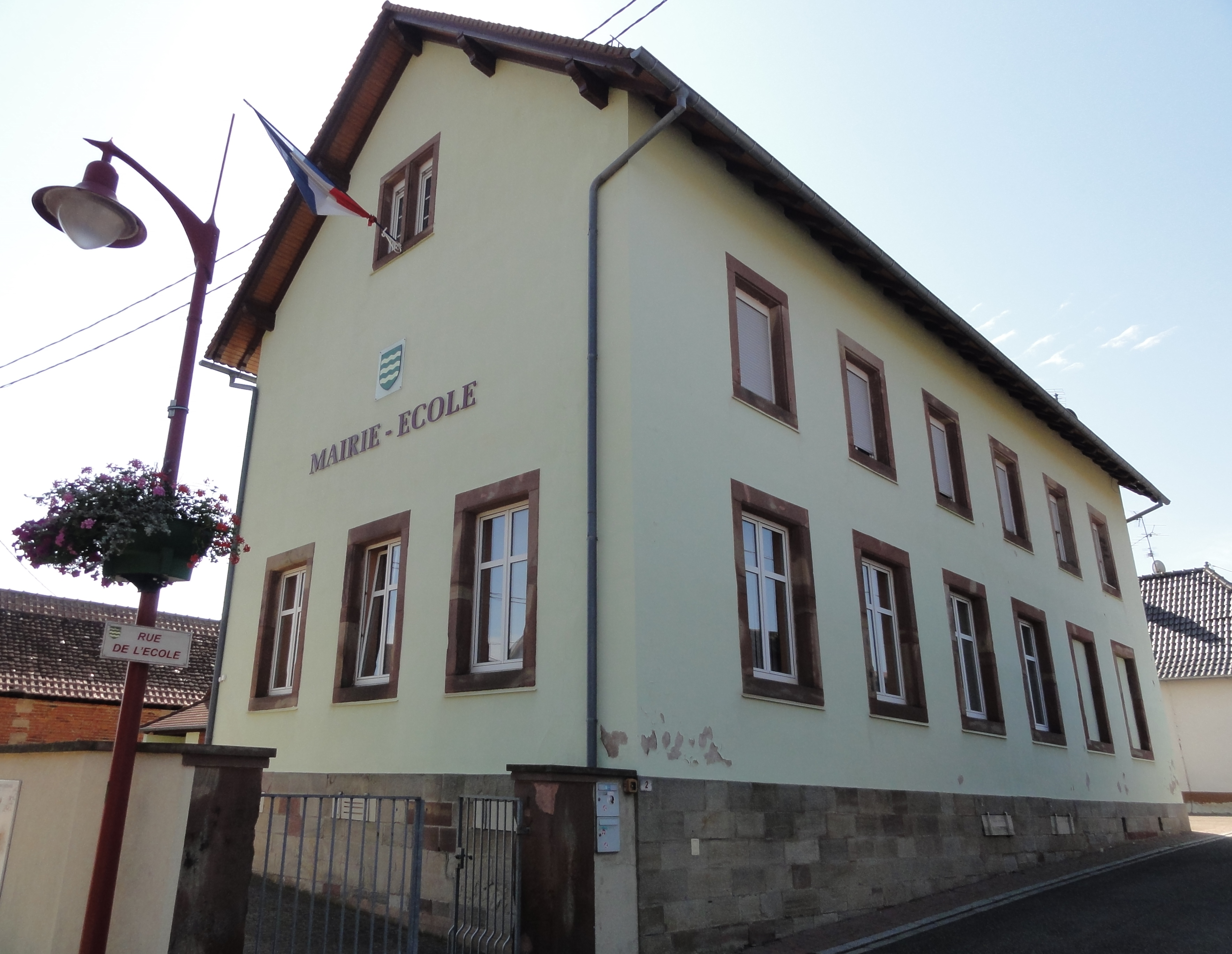 Alsace, Bas-Rhin, Reutenbourg, Mairie-école.